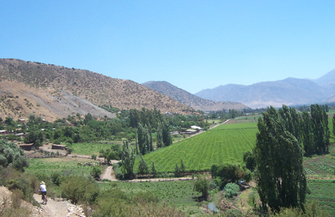 Aqui se aprecia el poblado de El Cobre de Catemu. A la derecha el Mineral de El Salado, actualmente en plena produccion cuprifera.